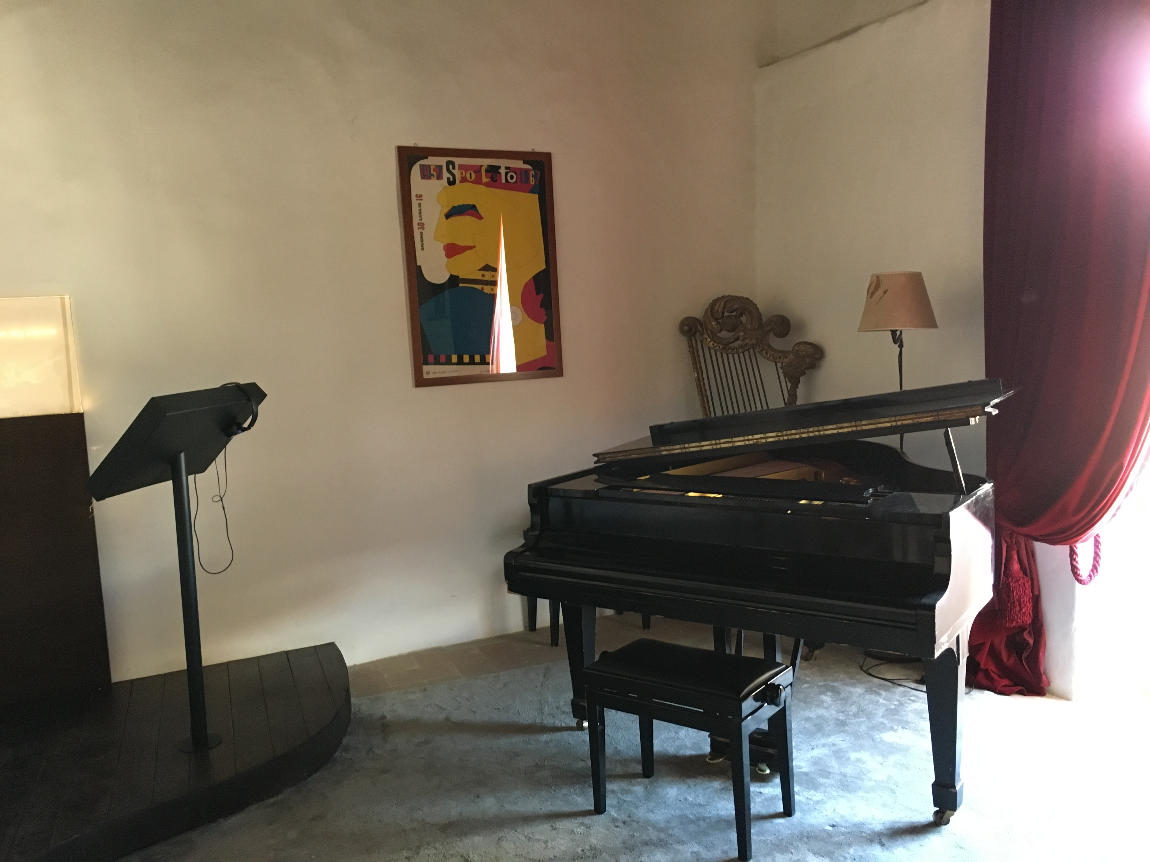 Casa Menotti Spoleto